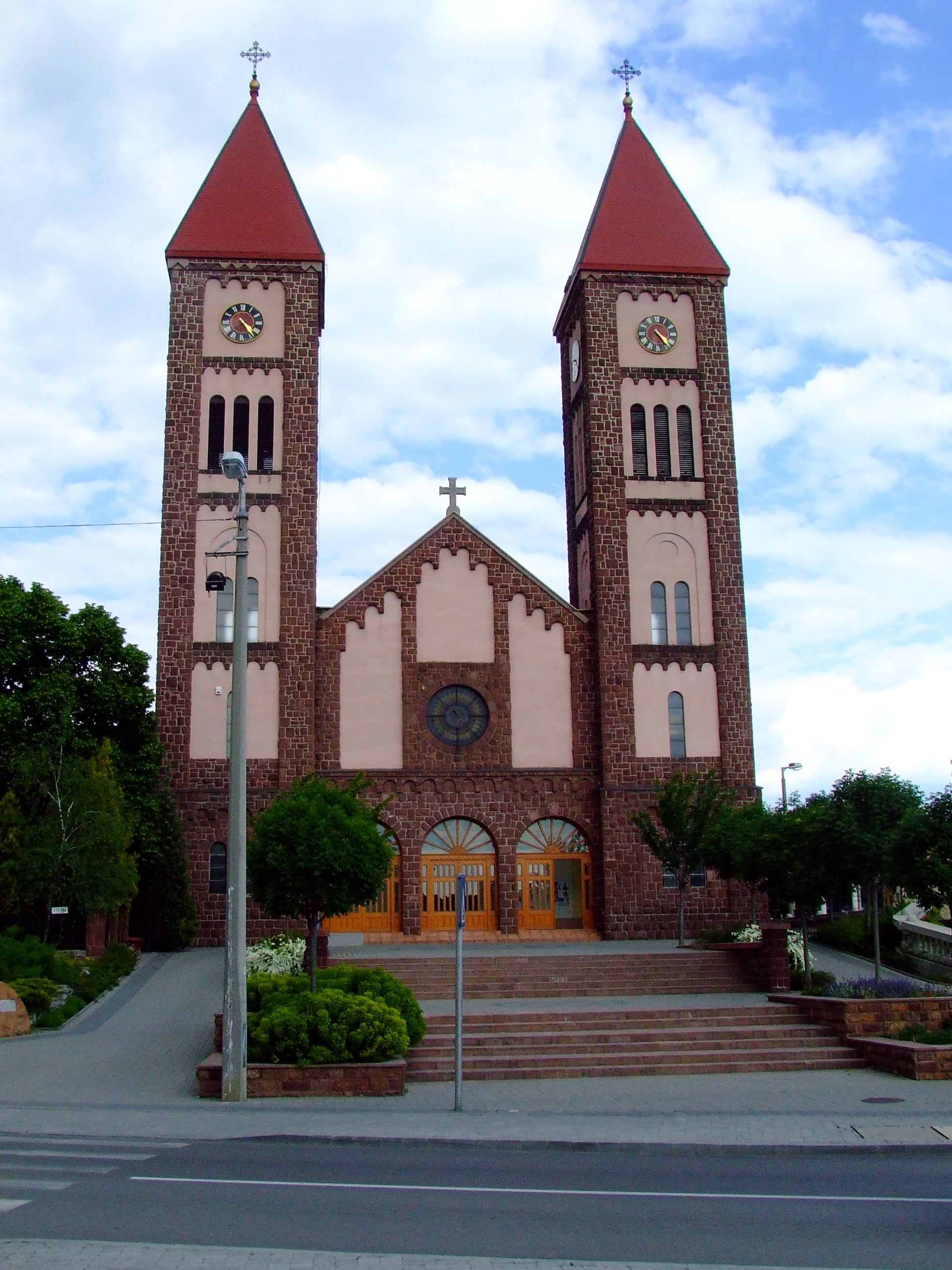 A balatonfüredi Krisztus Király-templom (helyi szóhasználatban vörös templom vagy piros templom). Épült 1926-27-ben, Fábián Gáspár tervei alapján (Szent István tér 1)